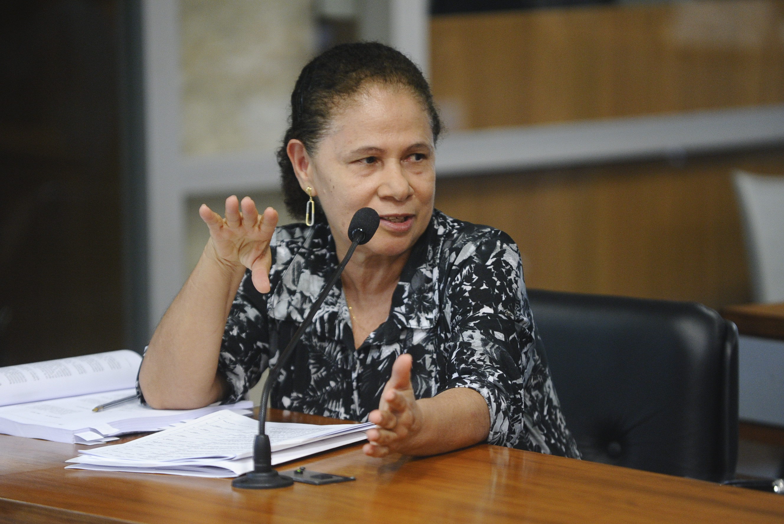 Comissão de Meio Ambiente, Defesa do Consumidor e Fiscalização e Controle (CMA) realiza reunião deliberativa 19 itens na pauta. Entre eles, PLC 61/2015, que autoriza a produção e venda, sob prescrição médica, de remédios para emagrecer; e PLS 368/2013, que define normas para regularizar área ocupada por agricultor familiar. Em pronunciamento, senadora Regina Sousa (PT-PI). Foto: Marcos Oliveira/Agência Senado.